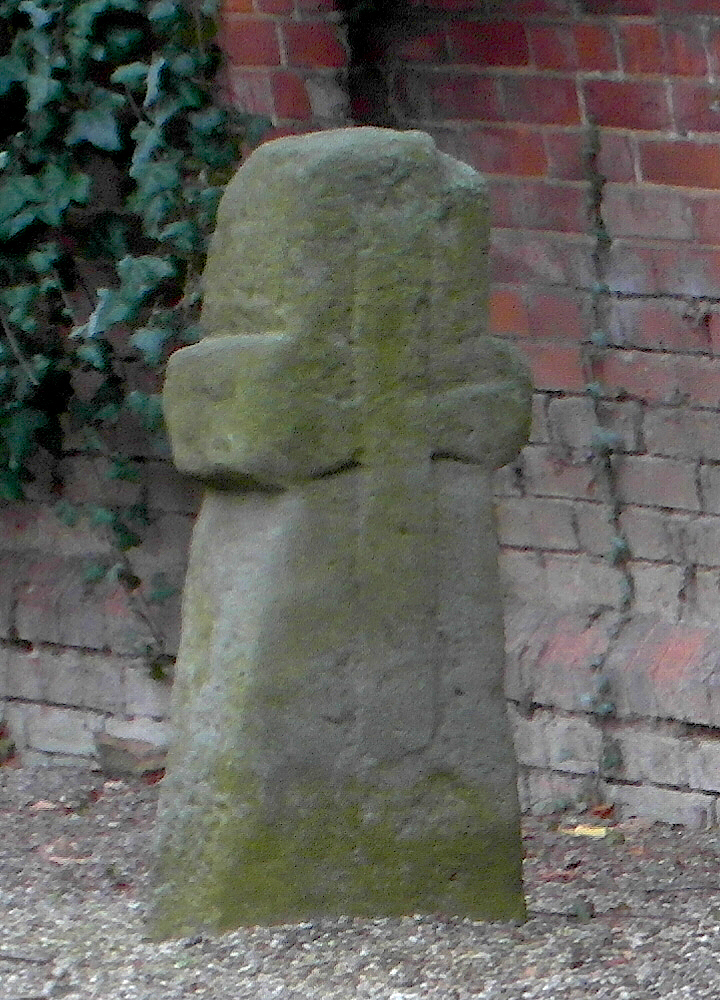 Der denkmalgeschützte Steinkreuz im Ortsteil Alt-Hemmingen der Stadt Hemmingen in der Region Hannover in Niedersachsen.